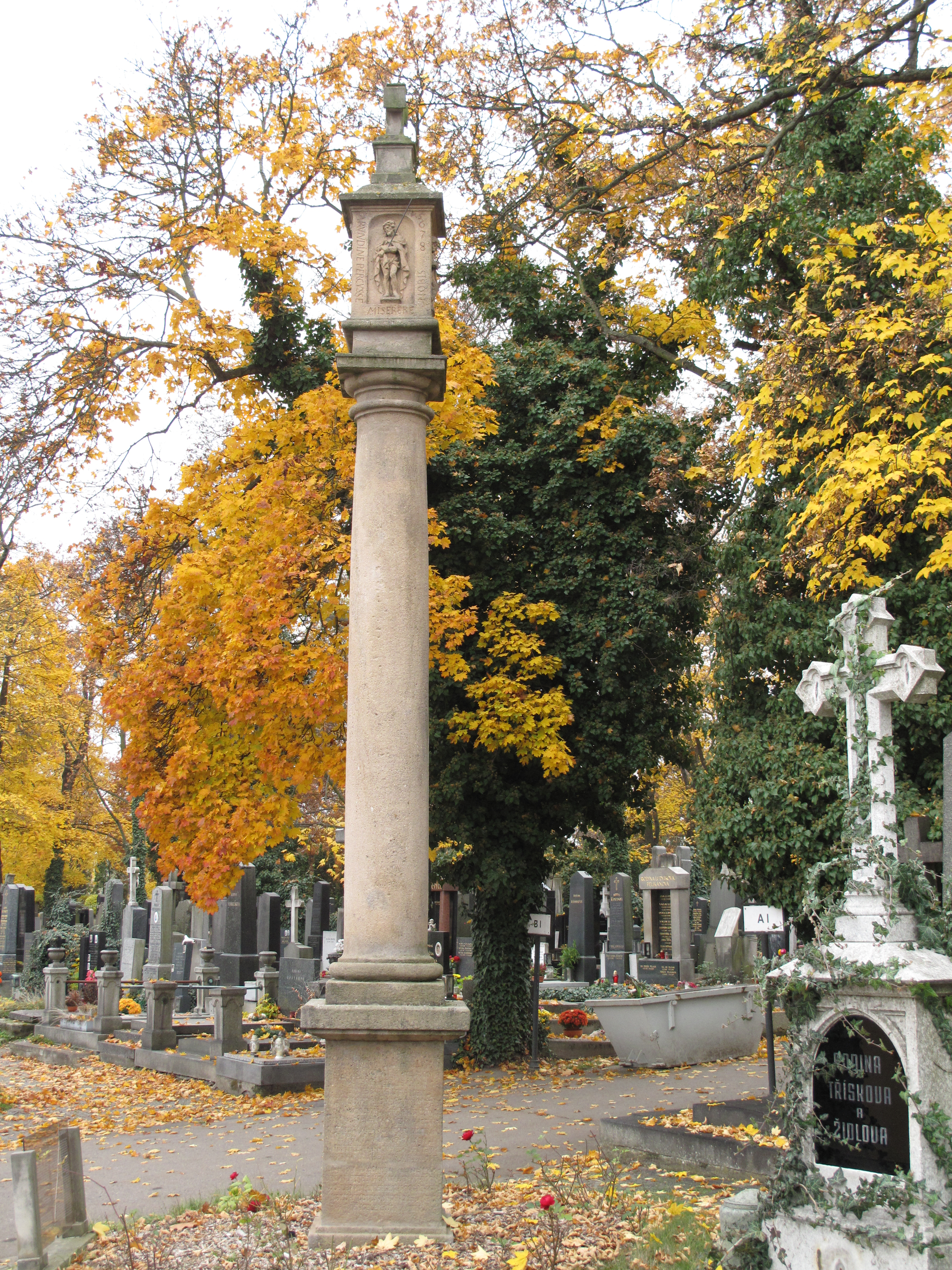 Hřbitov Malvazinky. Praha, Česká republika.